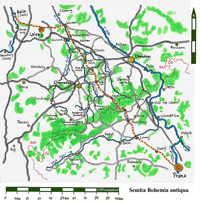 Wegeverlauf Alte Salzstrasse durch Sachsen und Böhmen zwischen Halle und Prag